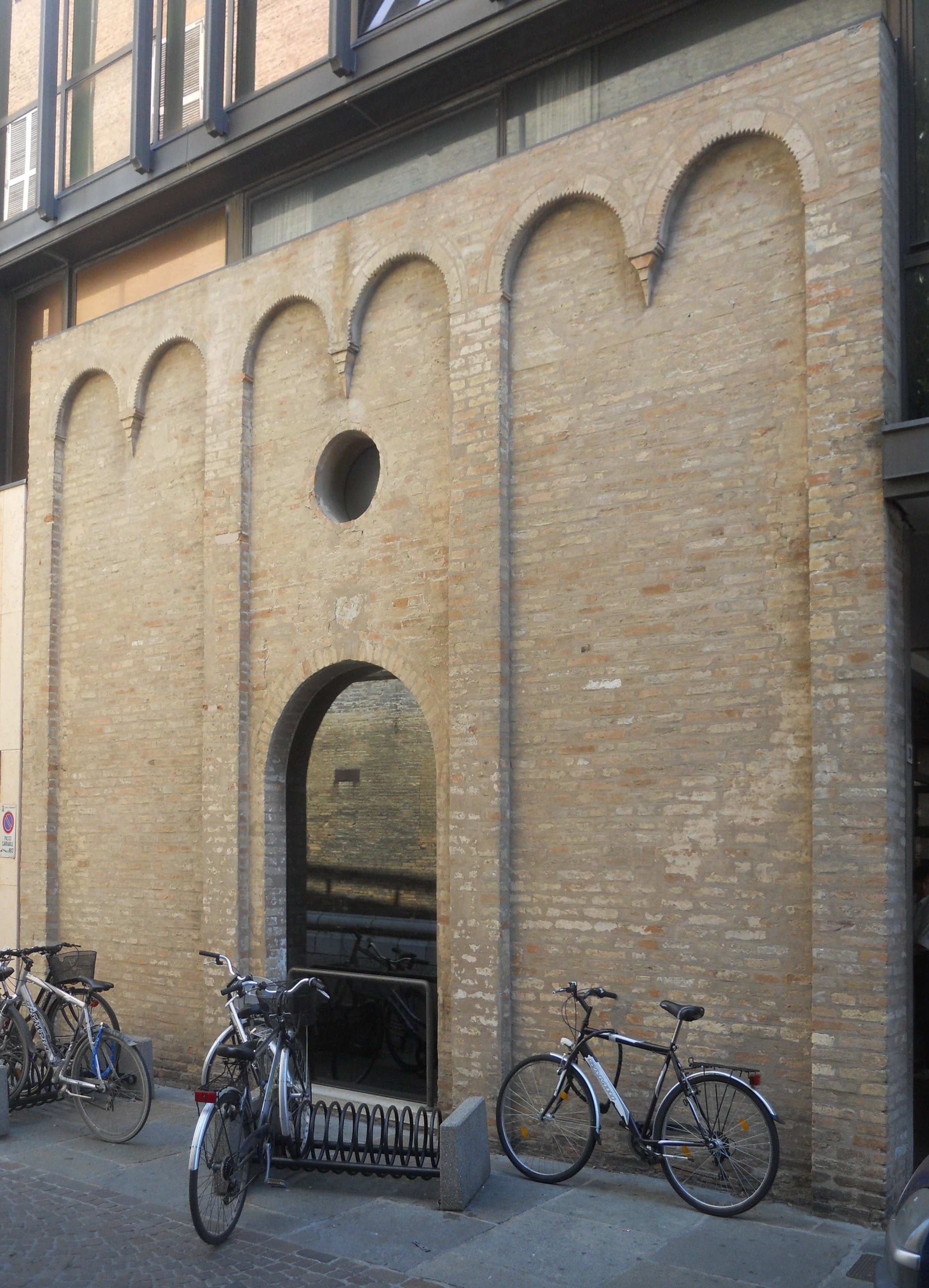 I resti della facciata del XV secolo della chiesa di Santa Giustina in Capite Porticus a Ravenna (demolita in gran parte nel XVIII secolo)